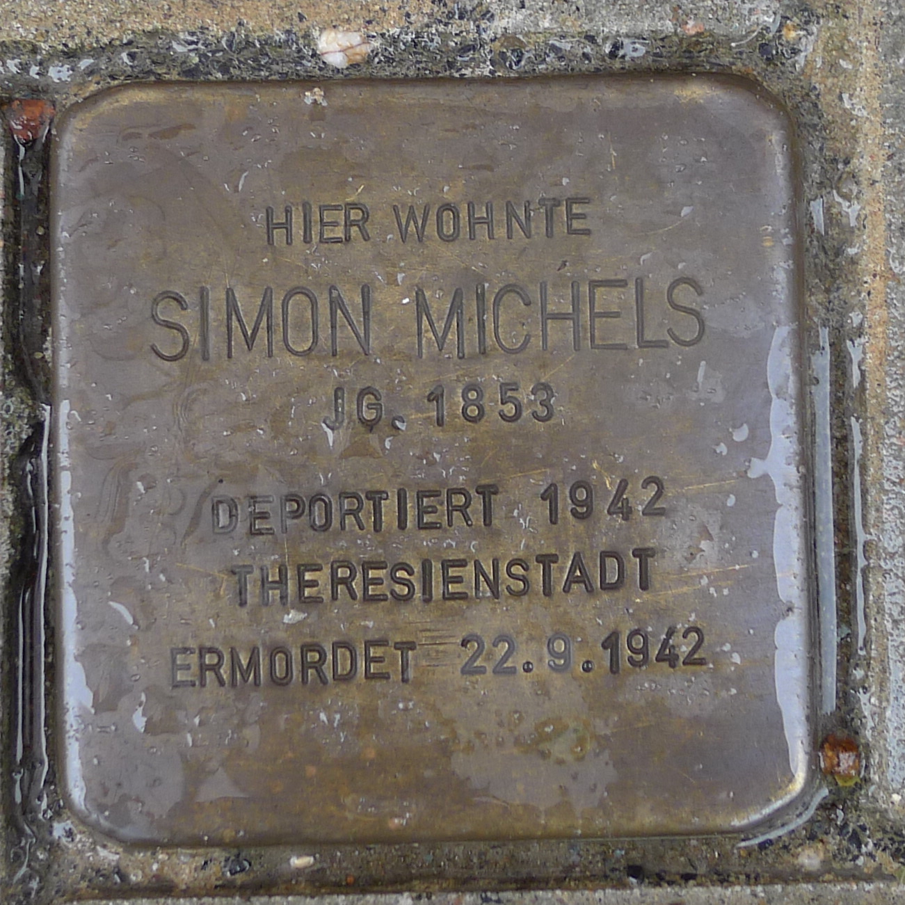 Stolperstein für Simon Michels, Kapaunenstraße 14, Greifswald